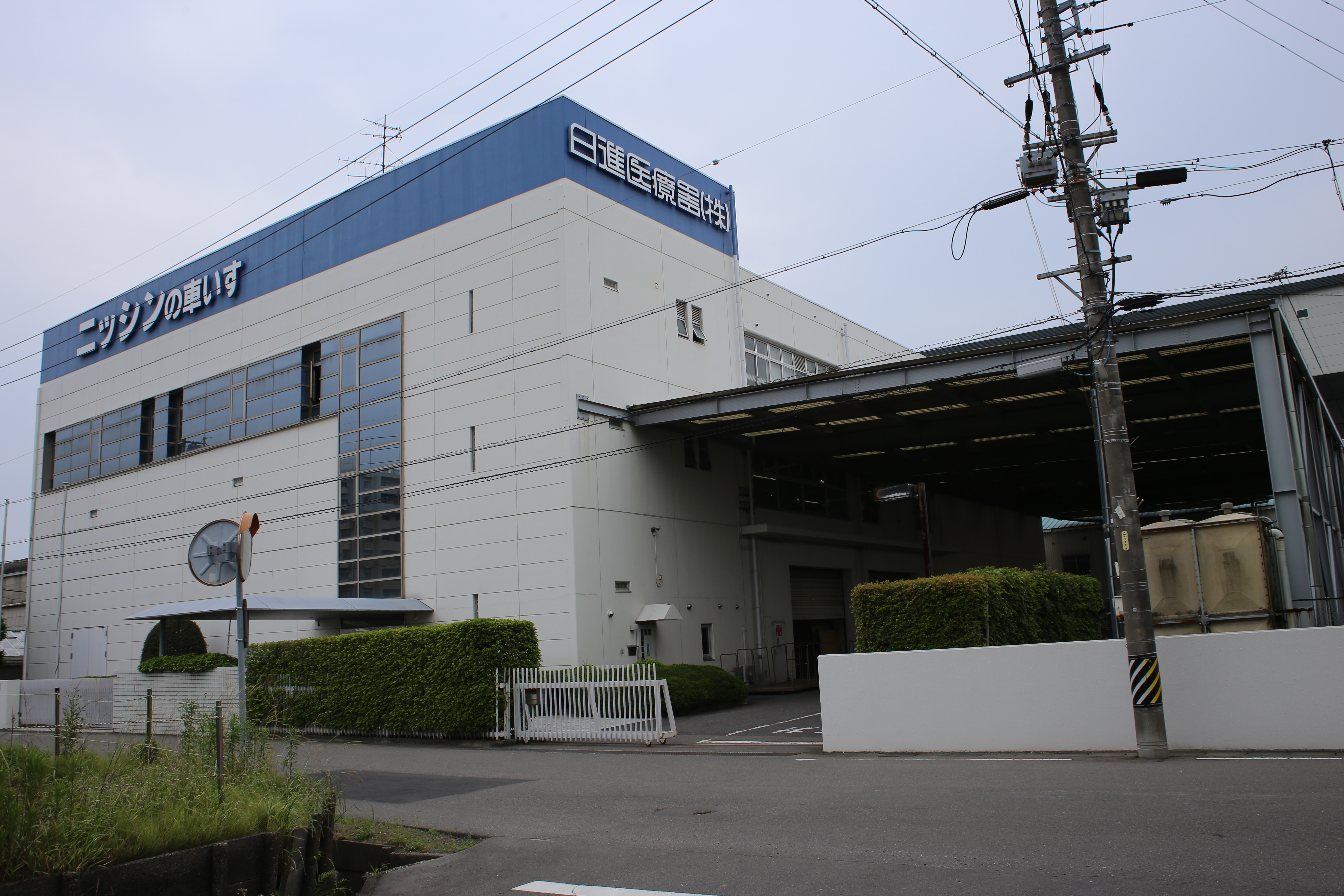 愛知県北名古屋市沖村権現の日進医療器本社を東側公道北側より撮影